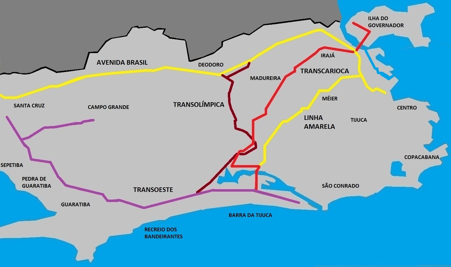 NovasViasCariocas-TransOeste, TransCarioca e TransOlímpica